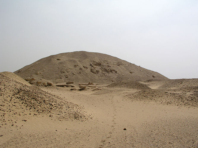 vue de la pyramide de Sésostris Ier à Licht